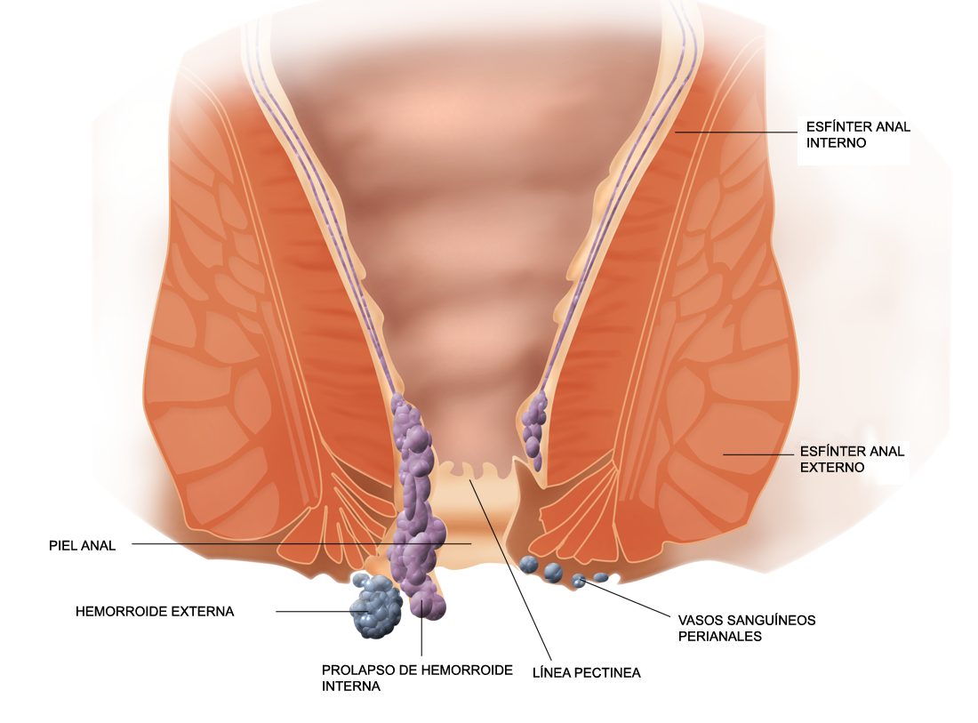 Hemorroides